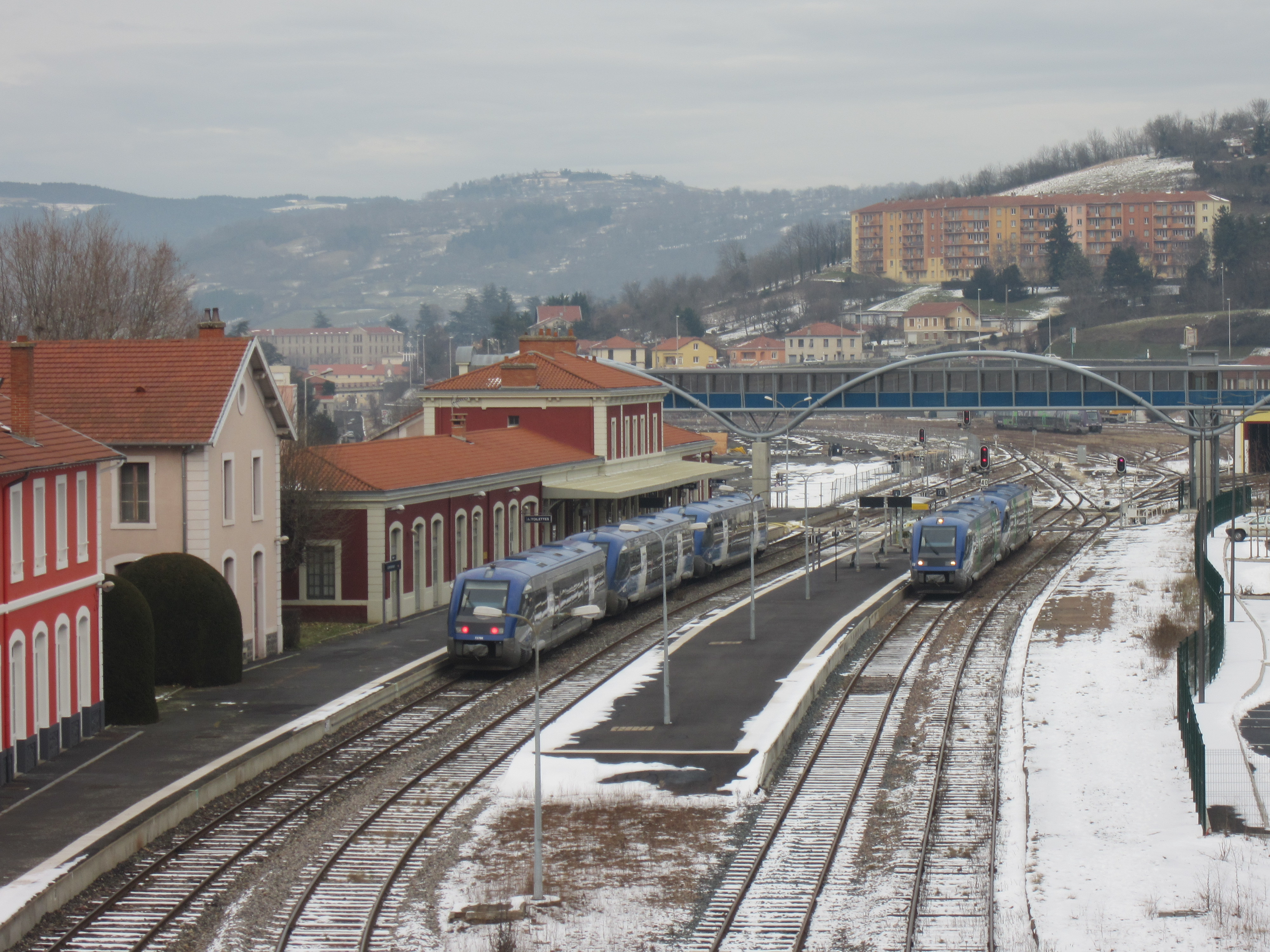 X 73500 en gare SNCF du Puy-en-Velay (43)